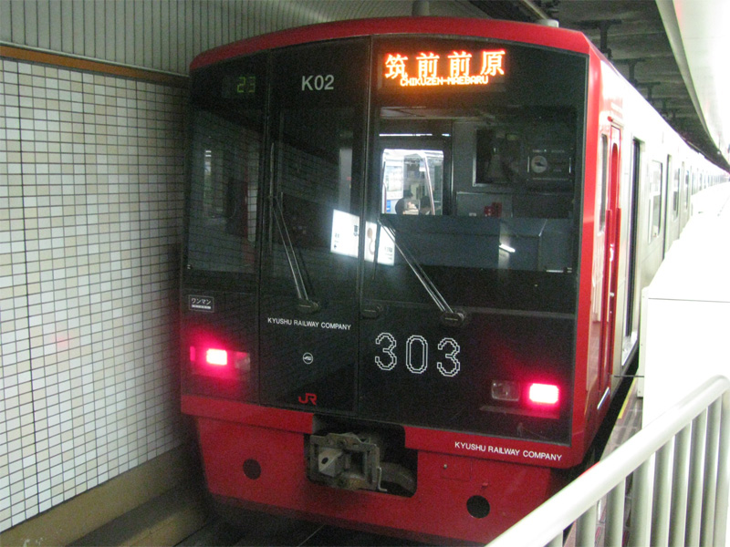 地下鉄_空港線_東比恵駅にて撮影